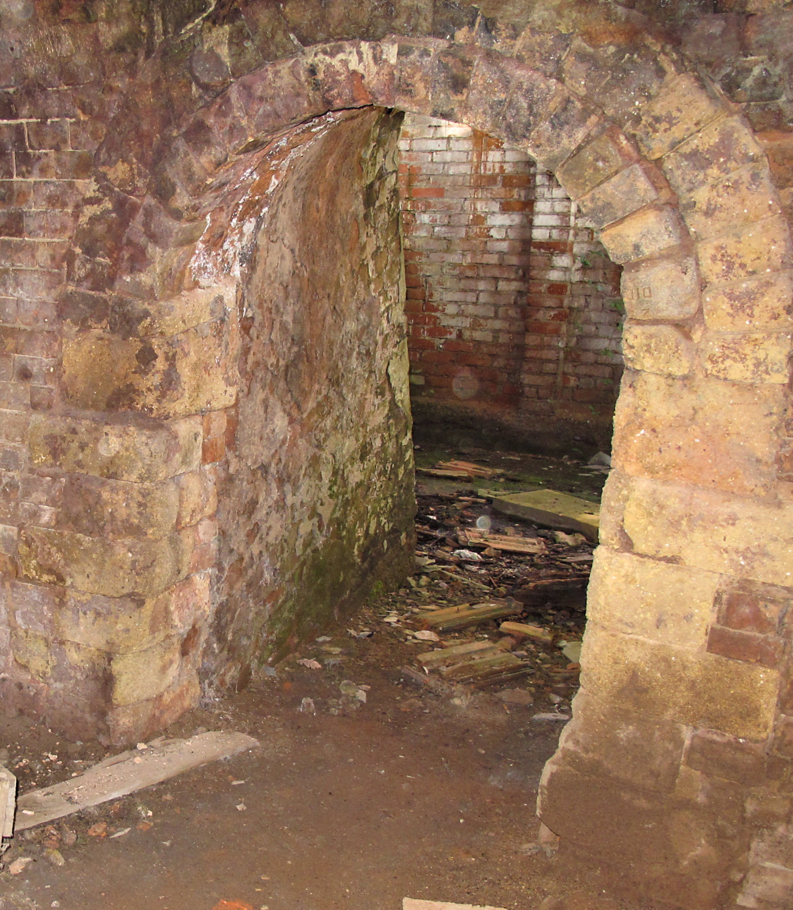 Blick aus dem Ringofen der Alten Ziegelei in Wiesbaden-Bierstadt